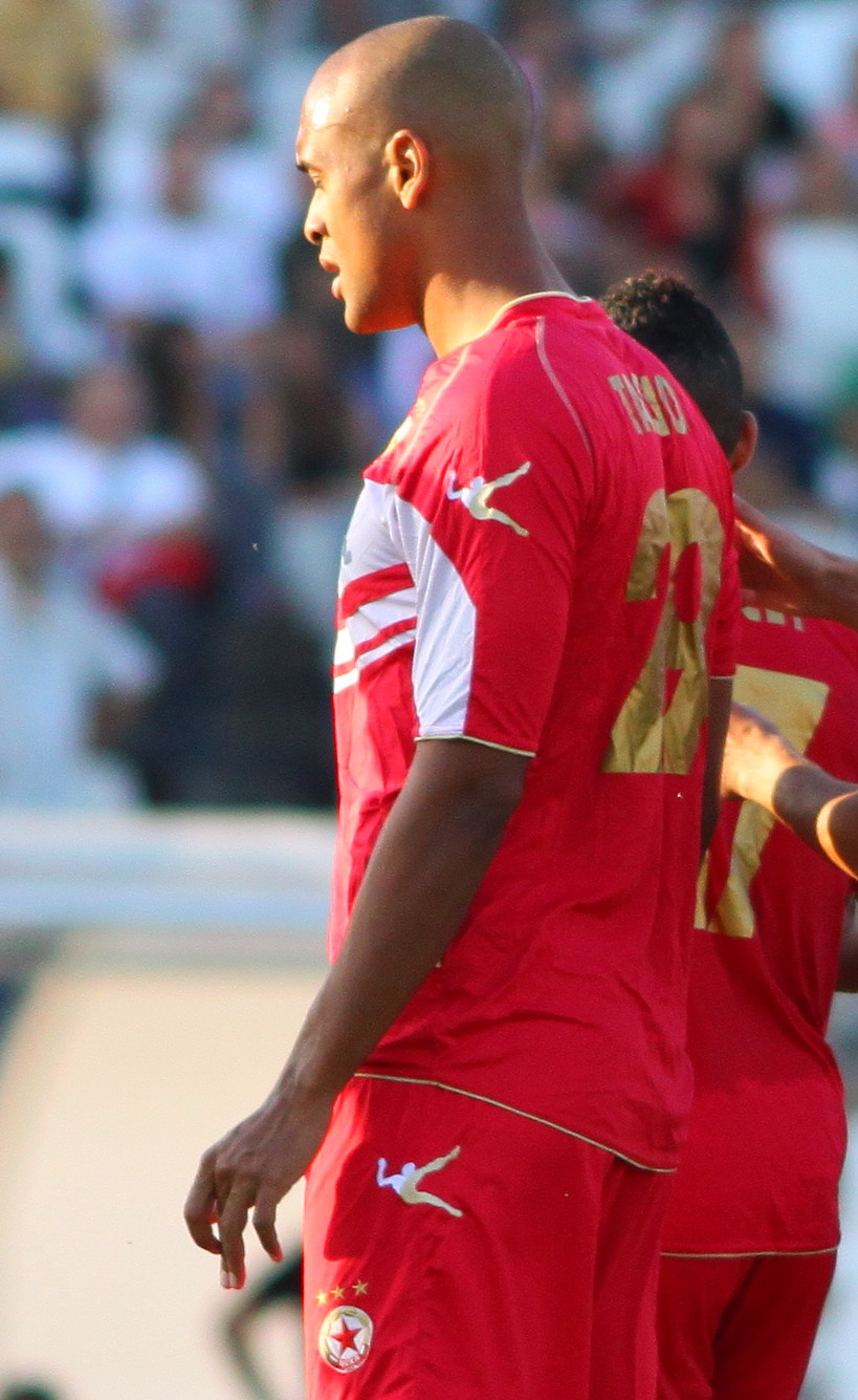 Тасио - бразилски футболист, състезател на ЦСКА София